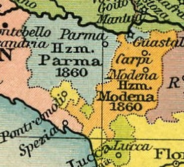 Emilia Occidentale dopo il Congresso di Vienna